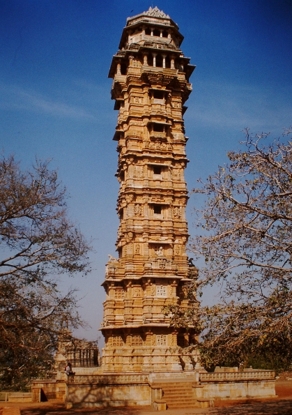 Chittorgarh, Vijay-Stambha